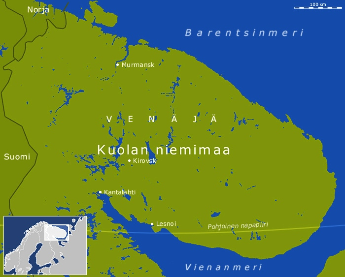 Kola peninsula